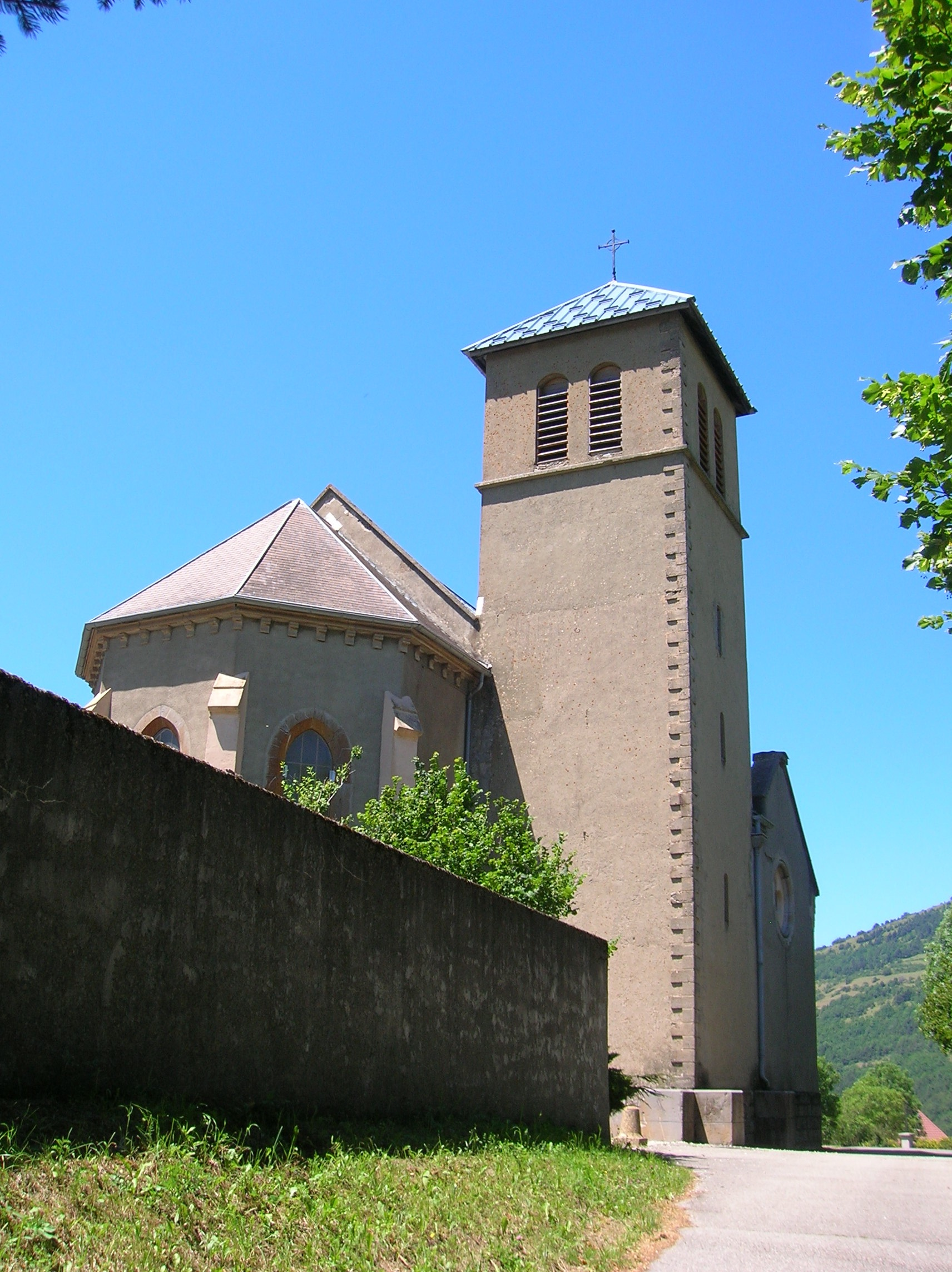 Les Côtes-de-Corps, Isère, France.